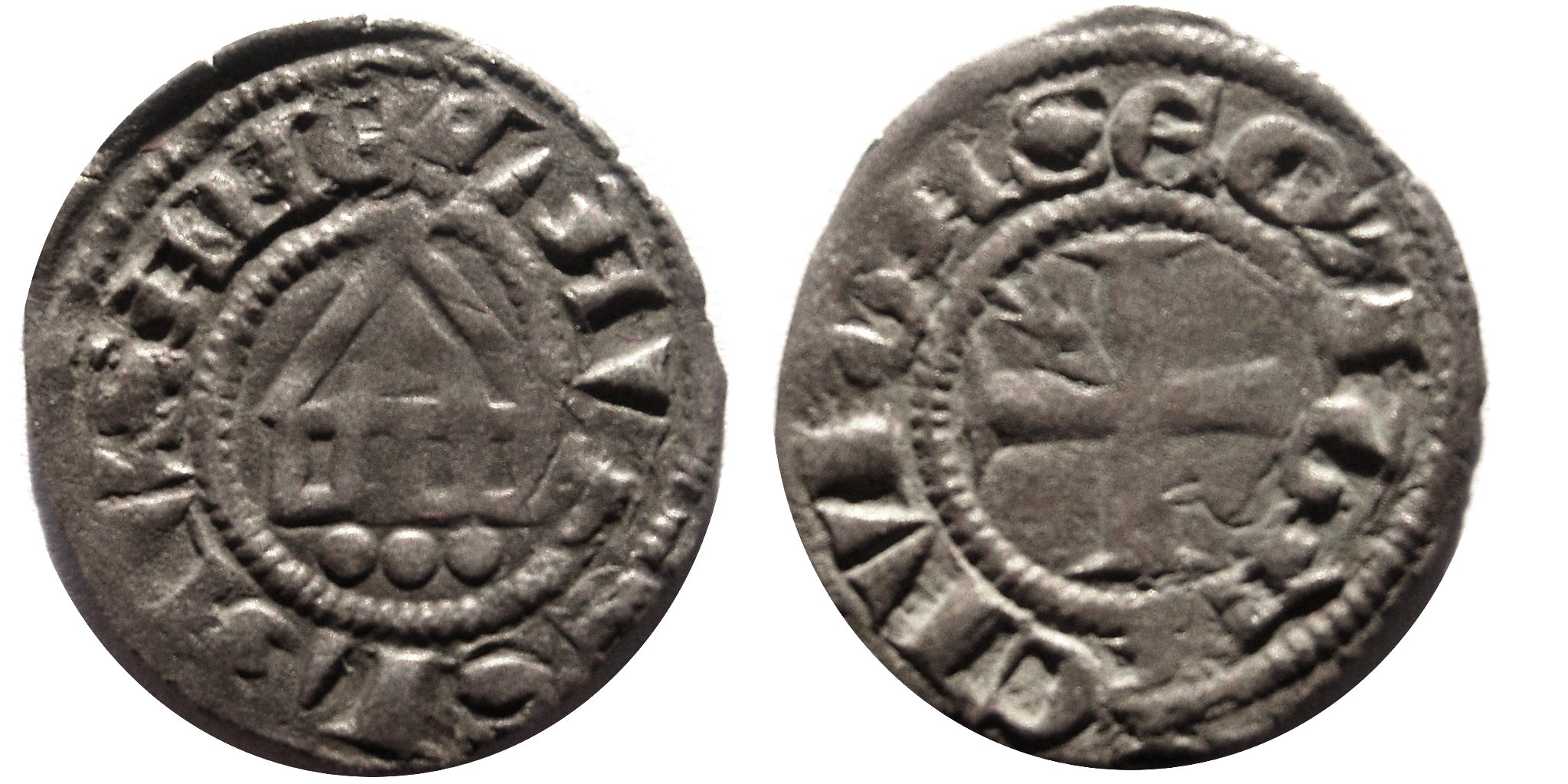 Description Lausanne denier anonyme au temple Date10 April 2009SourceOwn workAuthorJ. Courtois File:Lausanne denier au temple.jpg Lausanne denier anonyme au temple